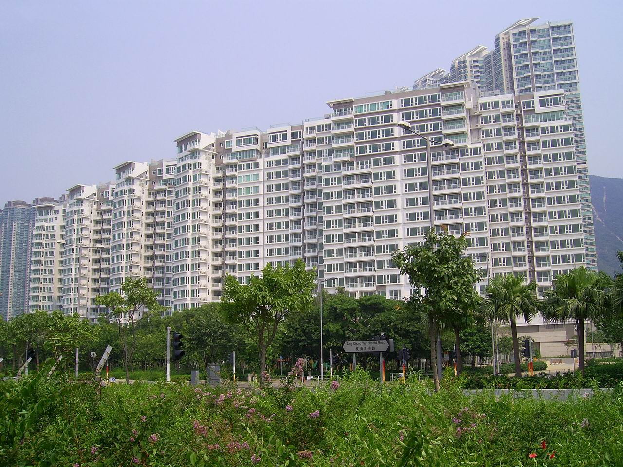 中文（香港）: 水藍天